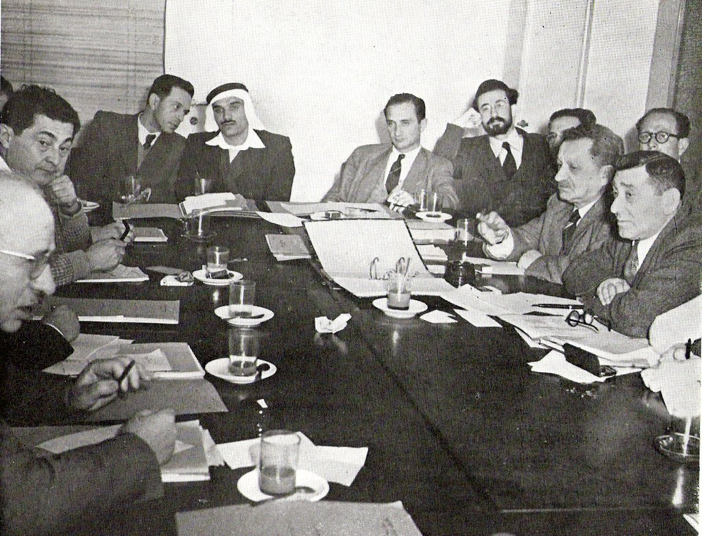 ישיבת he:ועדת הכנסת בראשות ח"כ he:דוד בר-רב-האי, בשנת he:1952 לערך.שני מימין he:יוסף שפרינצק. לשמאלו נשען על ידו הרב he:שלמה לורינץ.